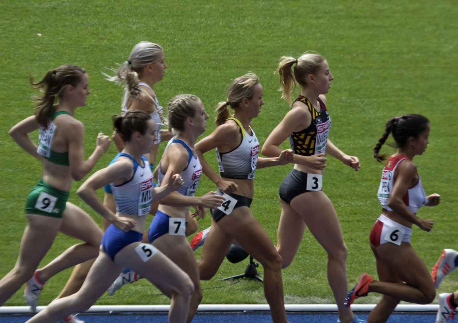 EKB42099 elise vanderelst 1500m